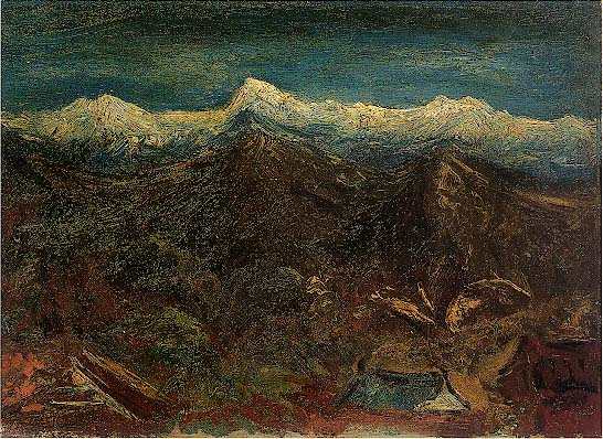 此幅據說是陳氏的絕筆之作。畫面的構圖與色調顯得較沈重，筆觸簡勁有力，色彩含蓄多變，甚而完全捨棄敘述性而轉向詩意的凝練。也許是冬天的景致，玉山山峰積雪未溶，日出的時刻姍姍來遲，近景的房舍和芭蕉雖然已沐浴於淡薄的金色光芒中，但寒冷的夜色仍籠罩著中景的山峰與深藍的天空。